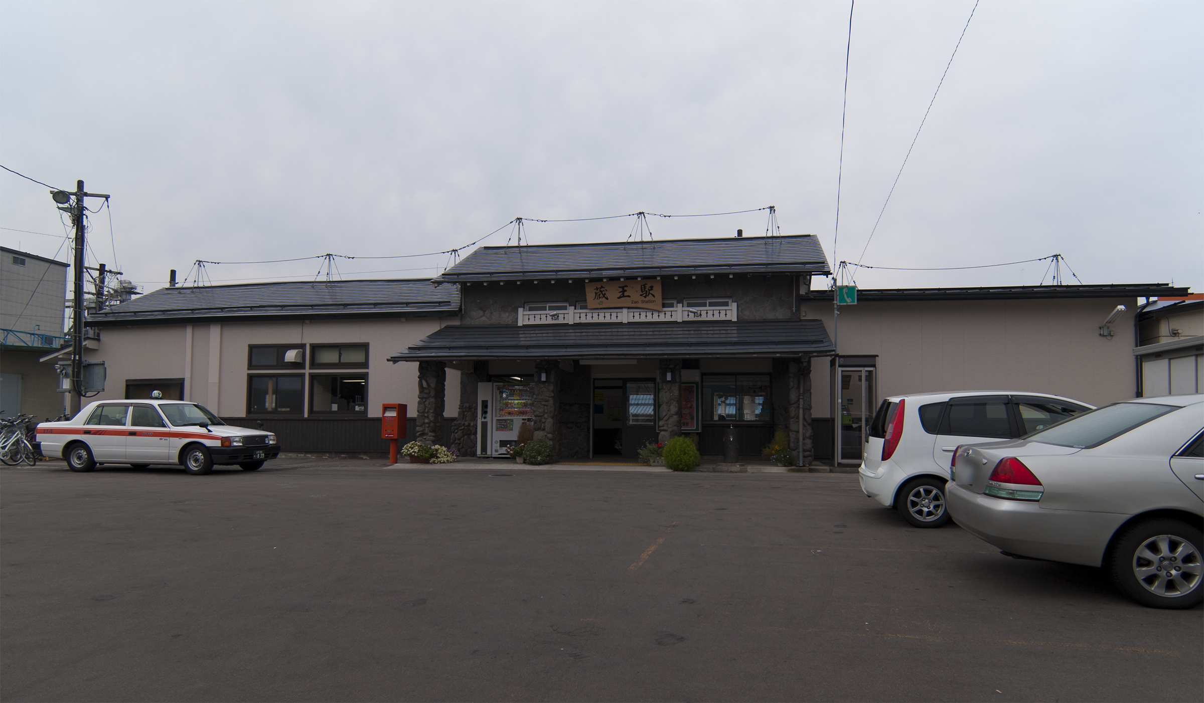 東日本旅客鉄道株式会社奥羽本線（JR山形線）蔵王駅駅舎